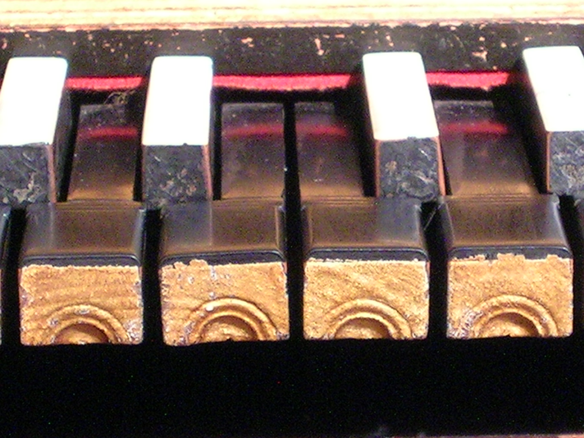 keys of Taskin 1788 harpsichord; Museum für Kunst und Gewerbe, Hamburg